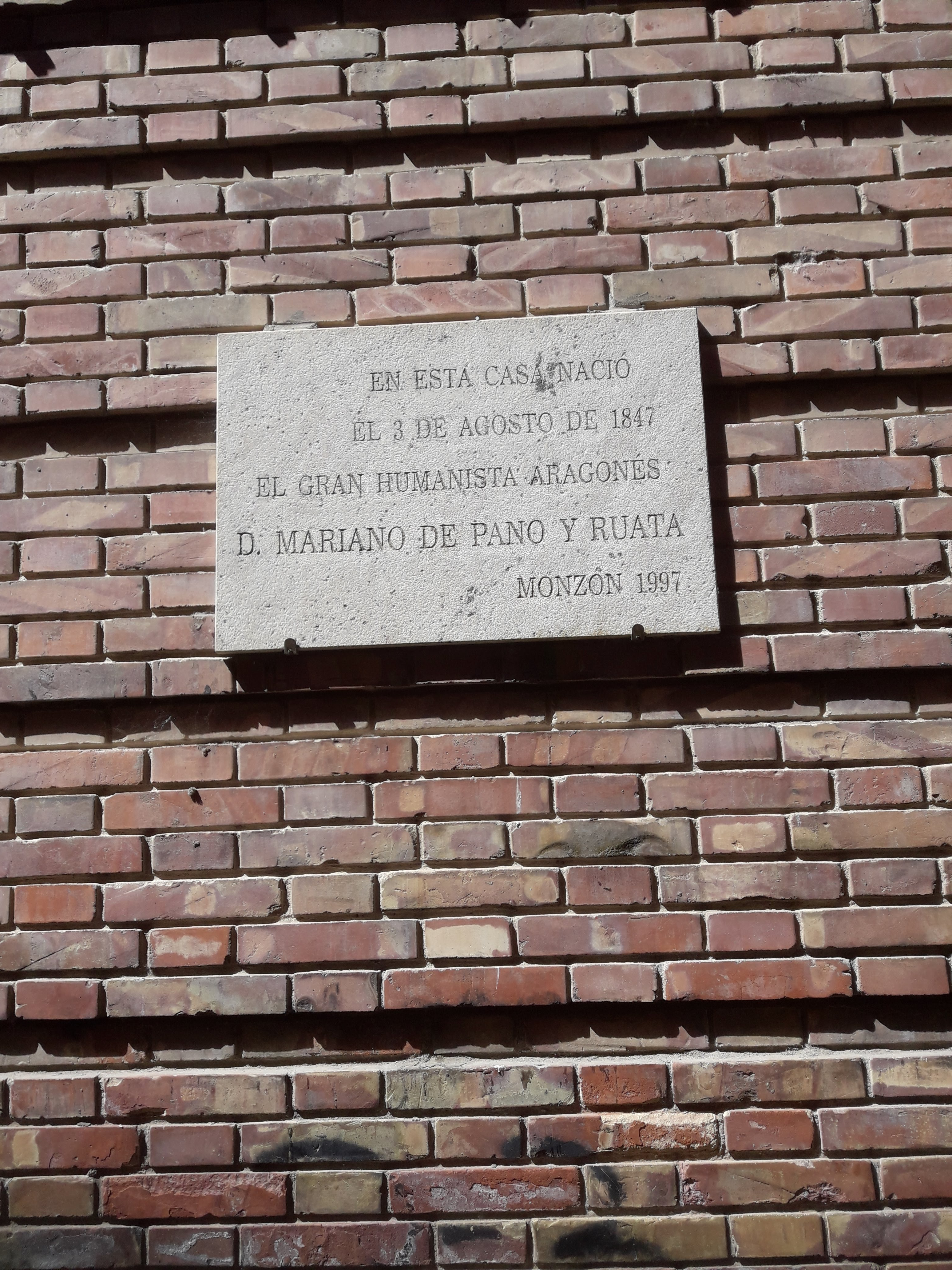 Una tarda de final de juliol a Montsó. Casa on va néixer Mariano de Pano y Ruata.